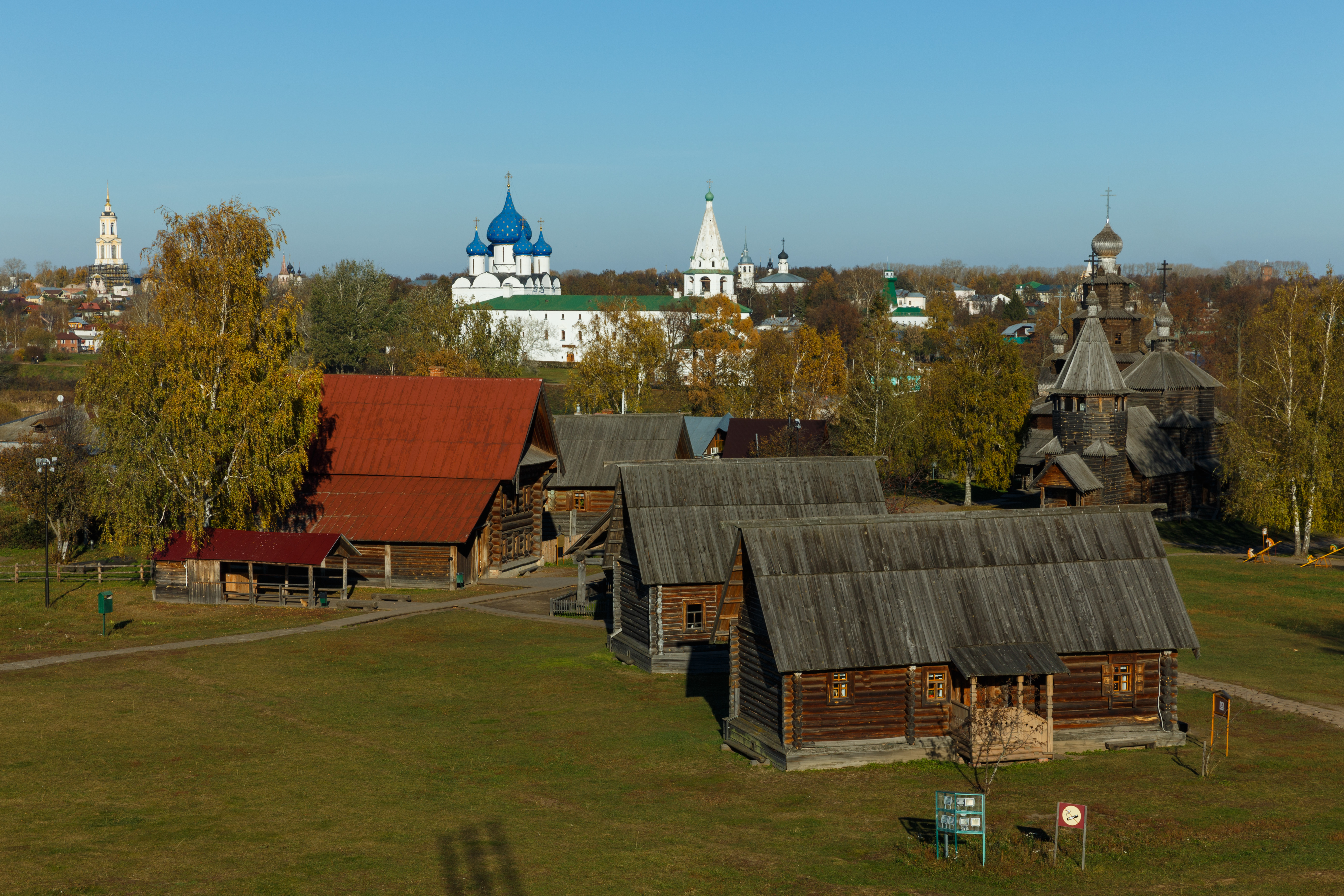 Музей деревянного зодчества